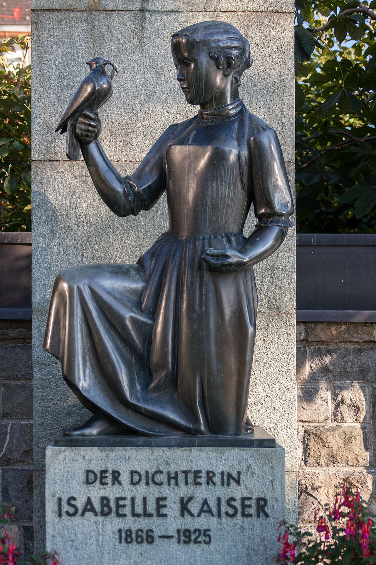 Denkmal für die Dichterin Isabelle Kaiser; Künstler: Hans von Matt.